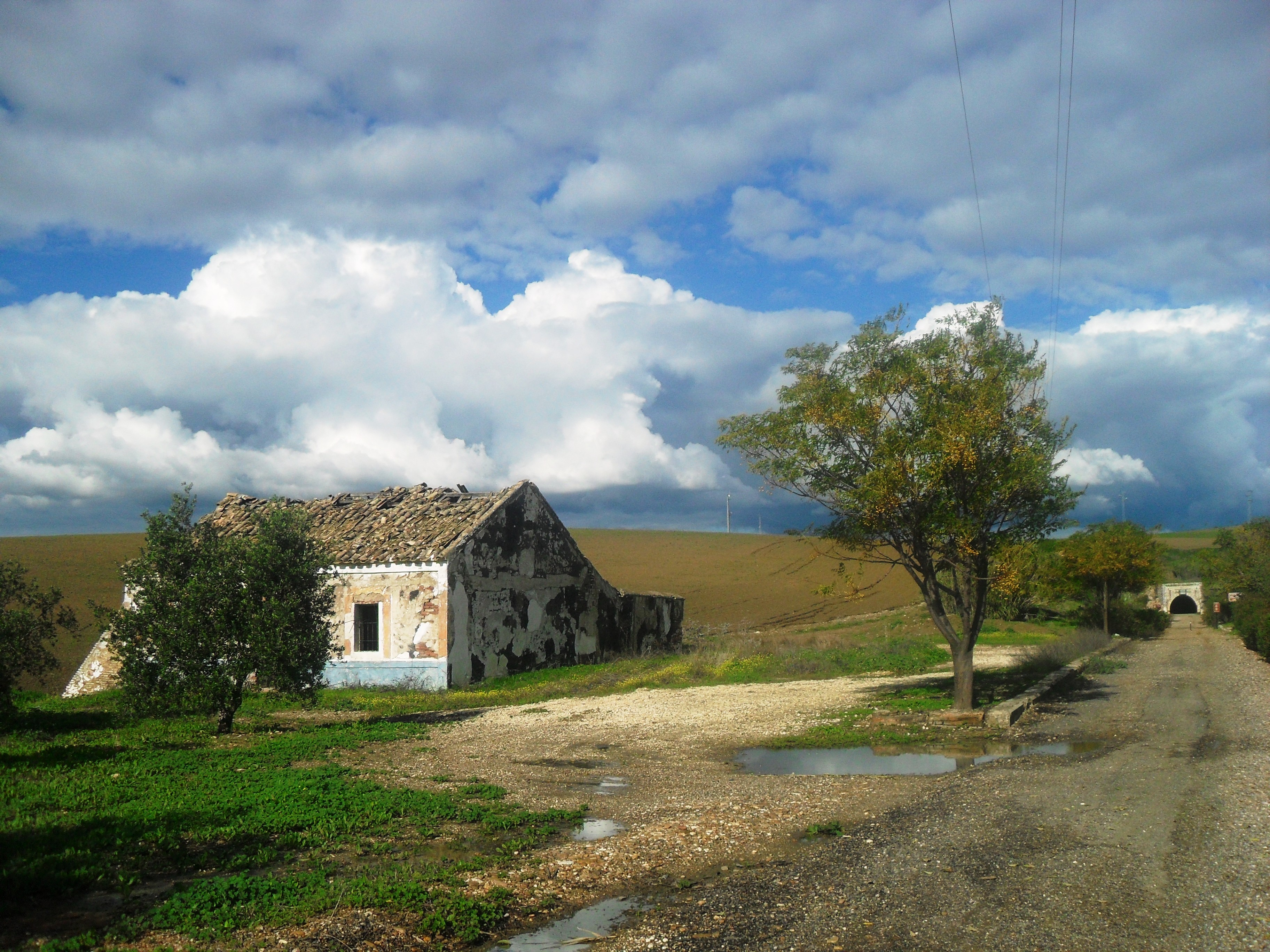 Estación de Las Tablas de Córdoba, situada a 7 km de la ciudad homónima.